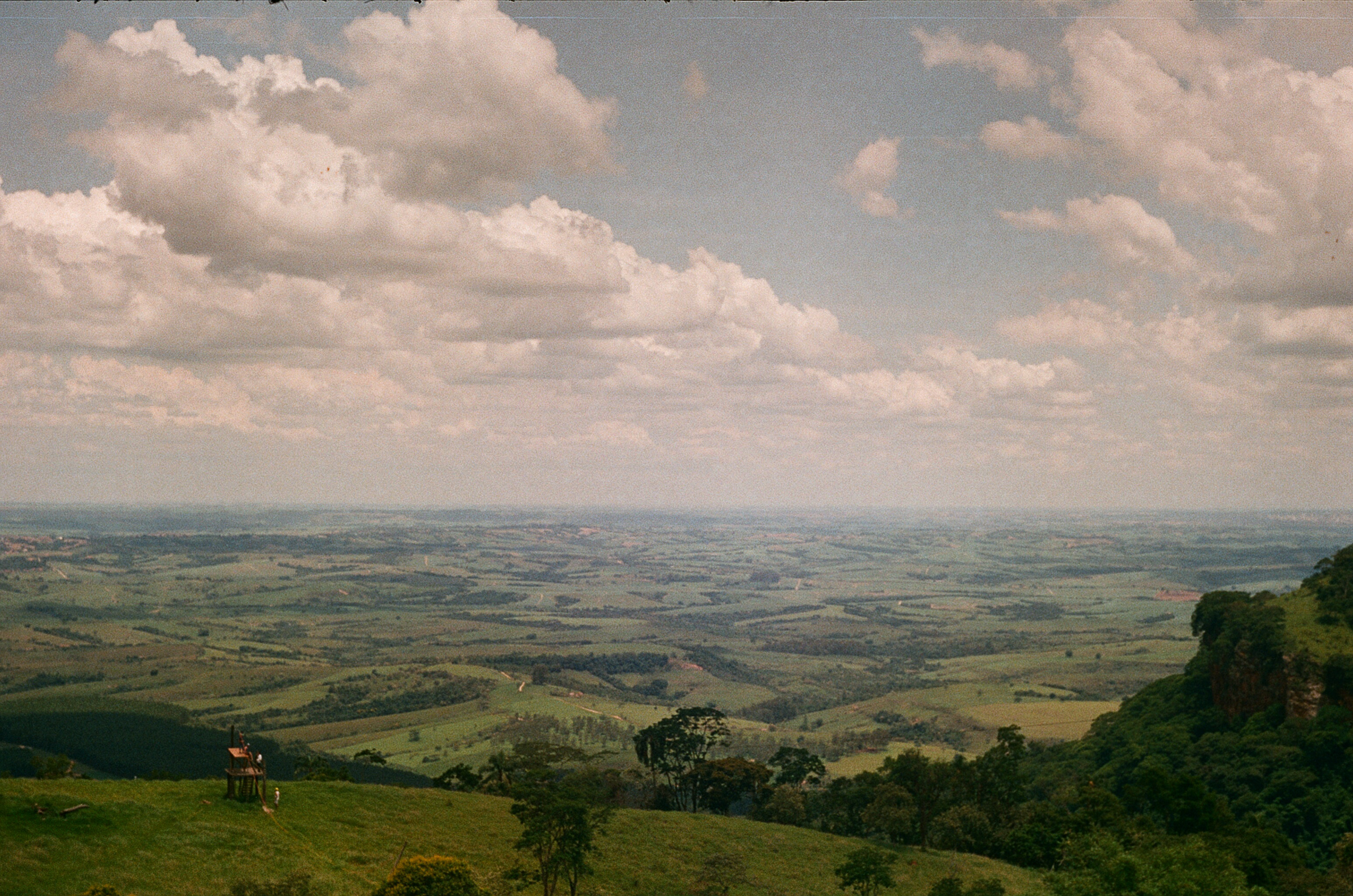 Panorama da região próxima ao município de Bauru, São Paulo, Brasil.